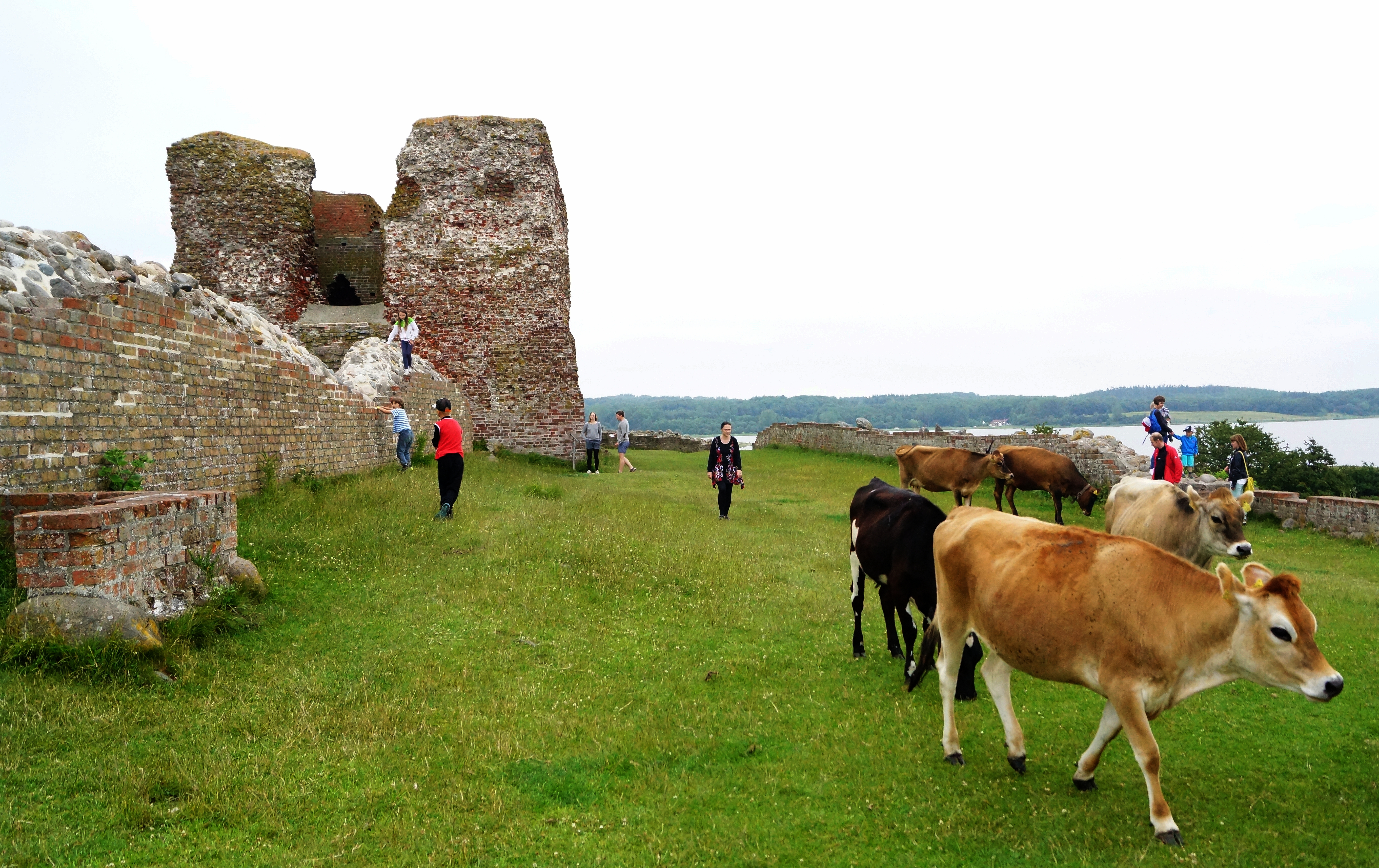 Kalø Slotsruin med køer og gæster